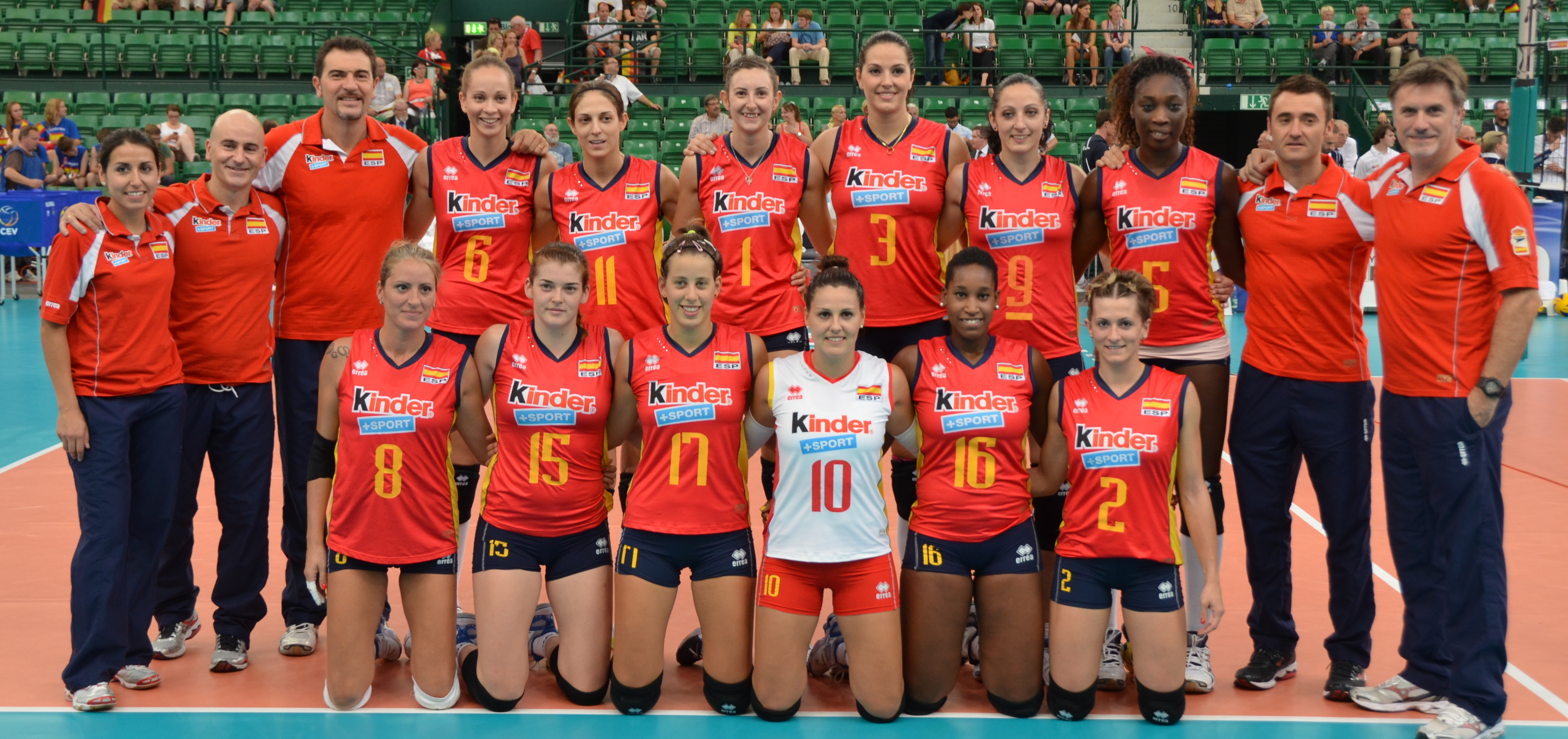 Vollyball Nationalmannschaft Spanien der Frauen